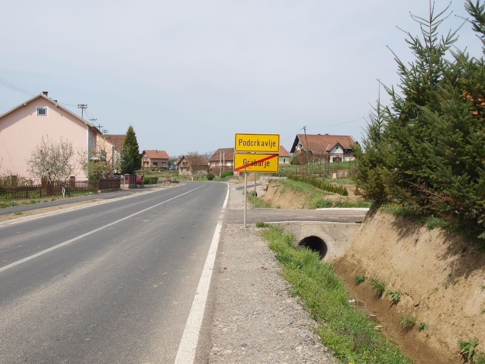 Ulaz u selo Podcrkavlje, Brodsko-posavska županija.